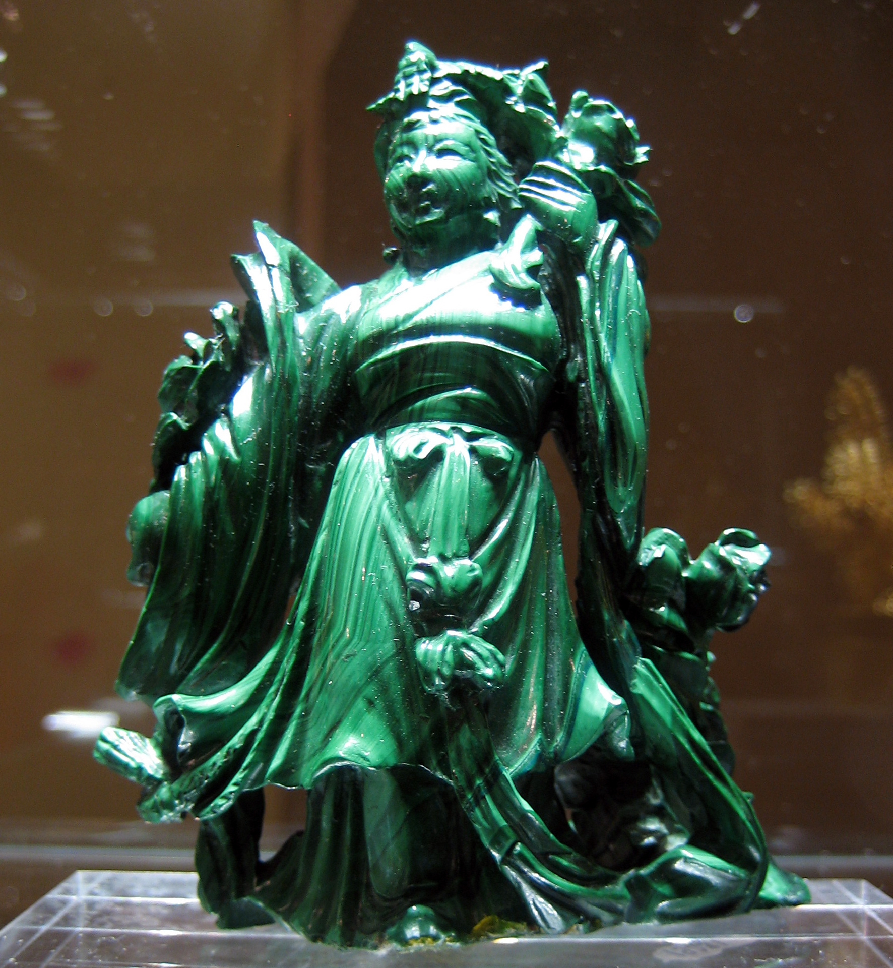 Malachite figure